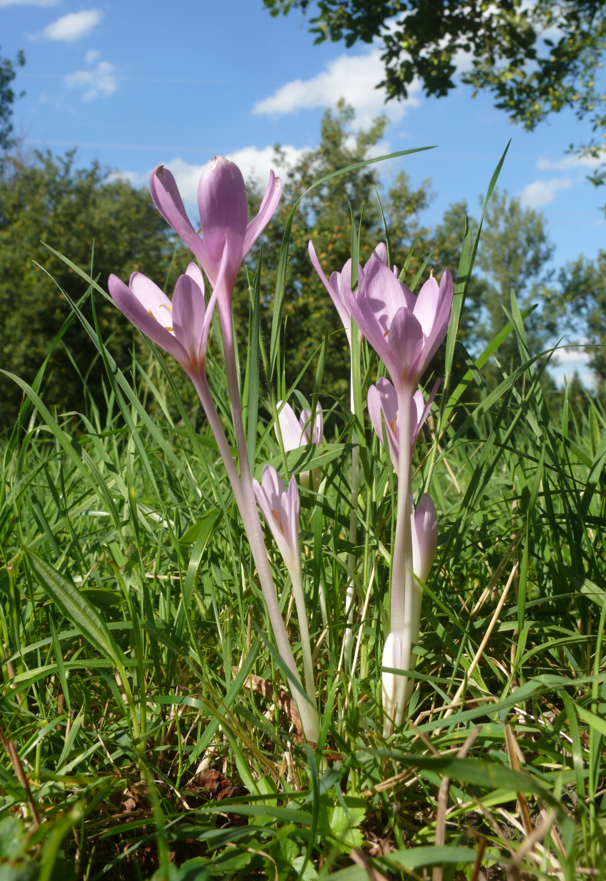 Colchicum autumnale, Schwäbisch-Fränkische Waldberge, Deutschland